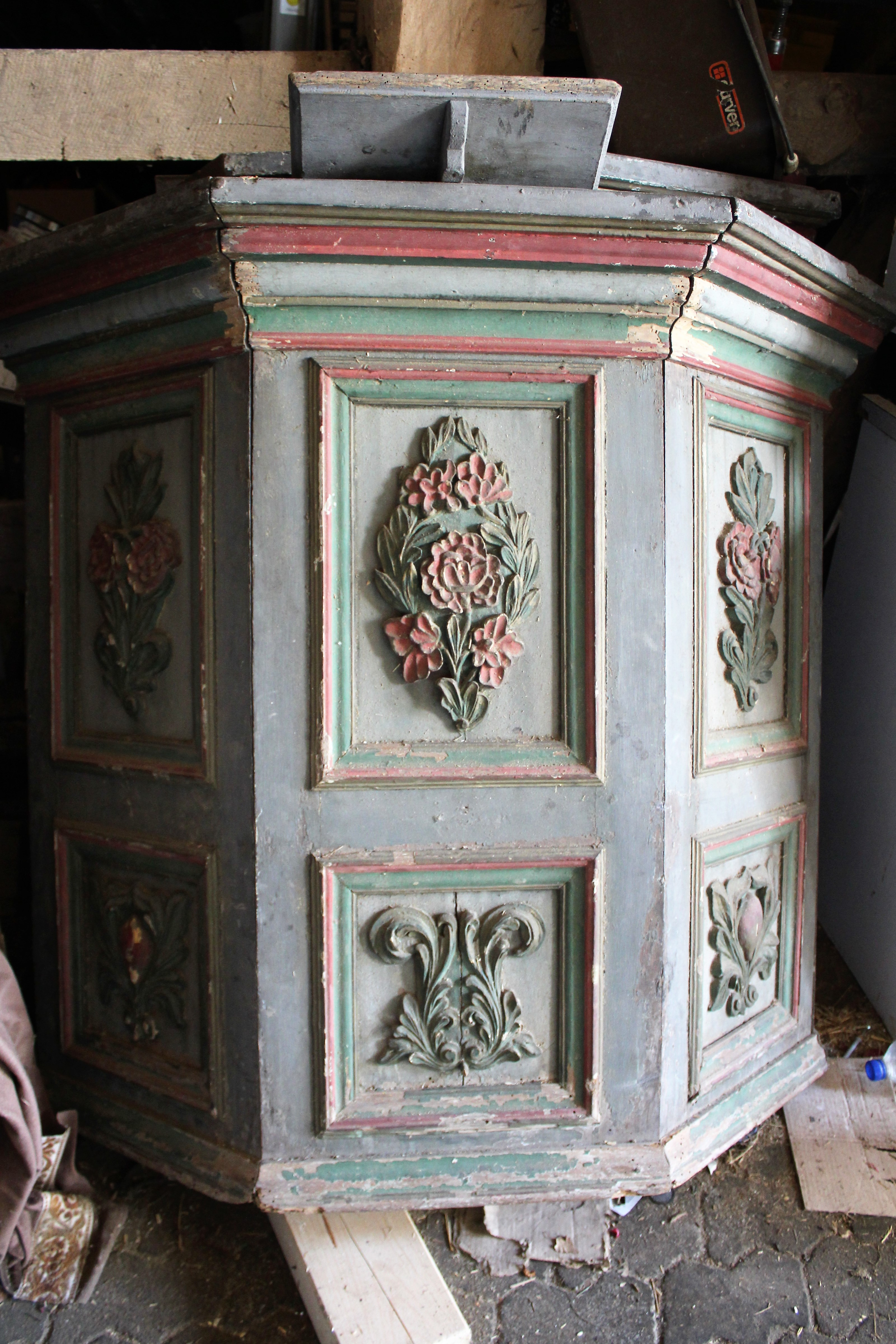 Ehemalige Kanzel von Erdhausen, Gemeinde Gladenbach, Landkreis Marburg-Biedenkopf, Hessen, Deutschland